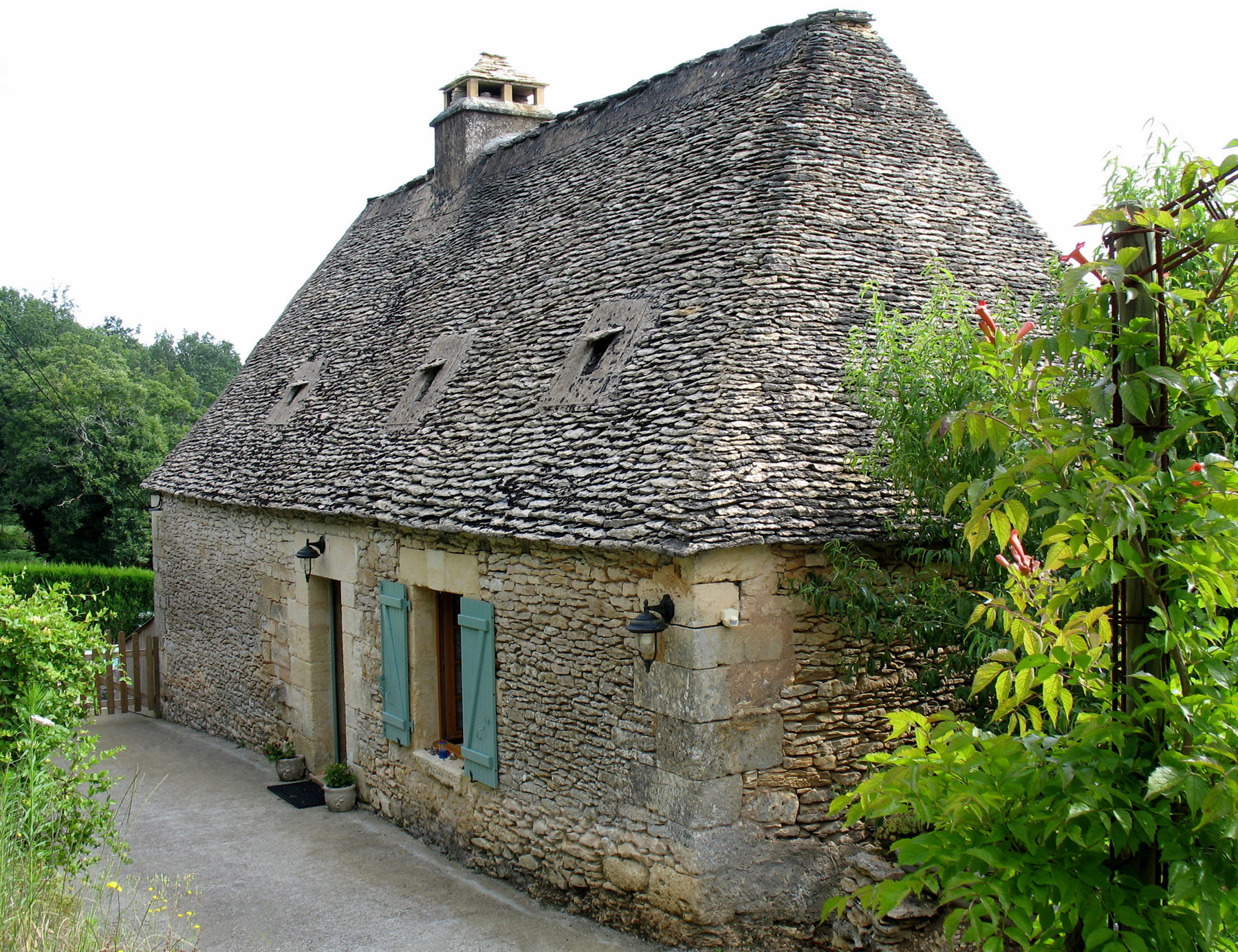 Maison en pierre, Meyrals (24220), lieu-dit : Boyer, Dordogne, France